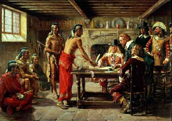 Underskrivelsen af fredsaftalen med indianerne 22. april 1642 i Jonas Bronchs hus Emanus i Ny Amsterdam